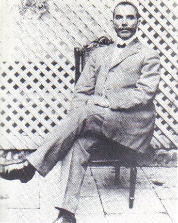 Portrait de l'homme politique haïtien Rosalvo Bobo